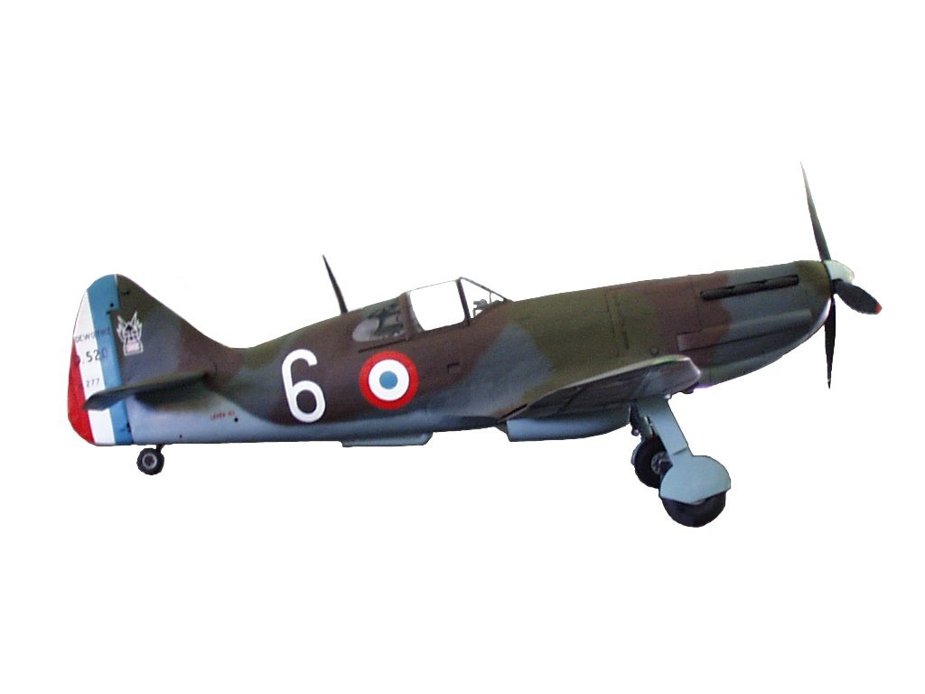 Dewoitine D.520 on display at Le Bourget